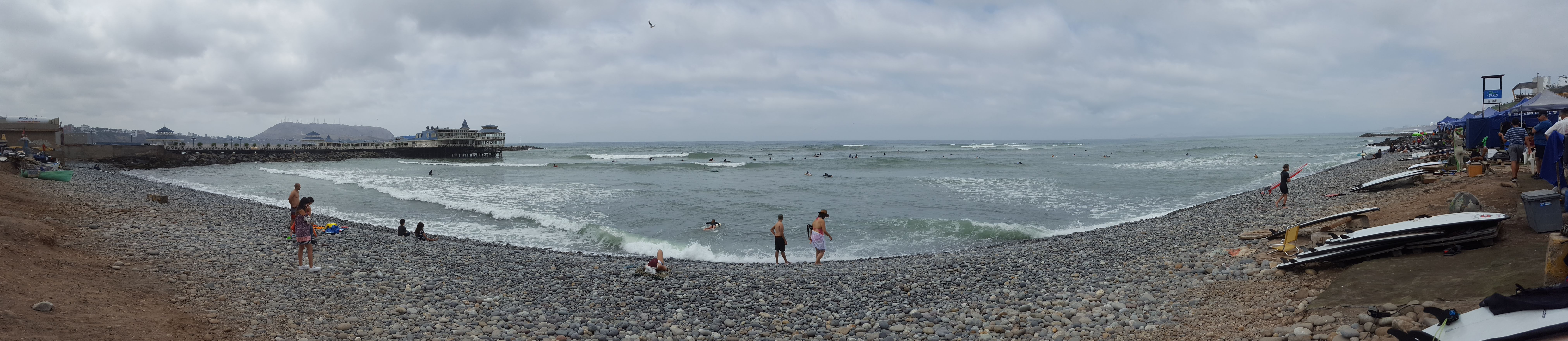 Playa Redondo 1 Miraflores - Lima Perú